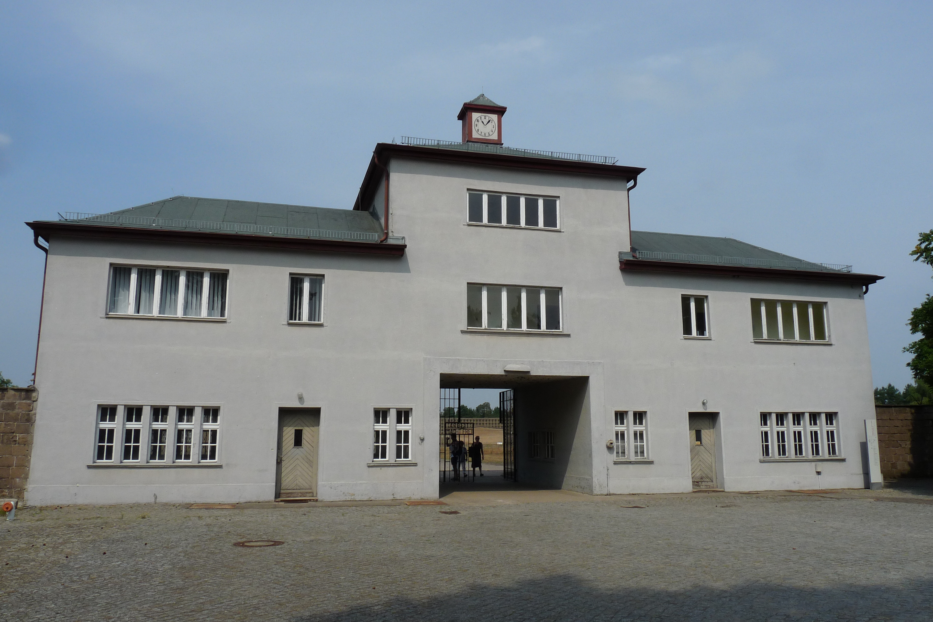 Oranienburg